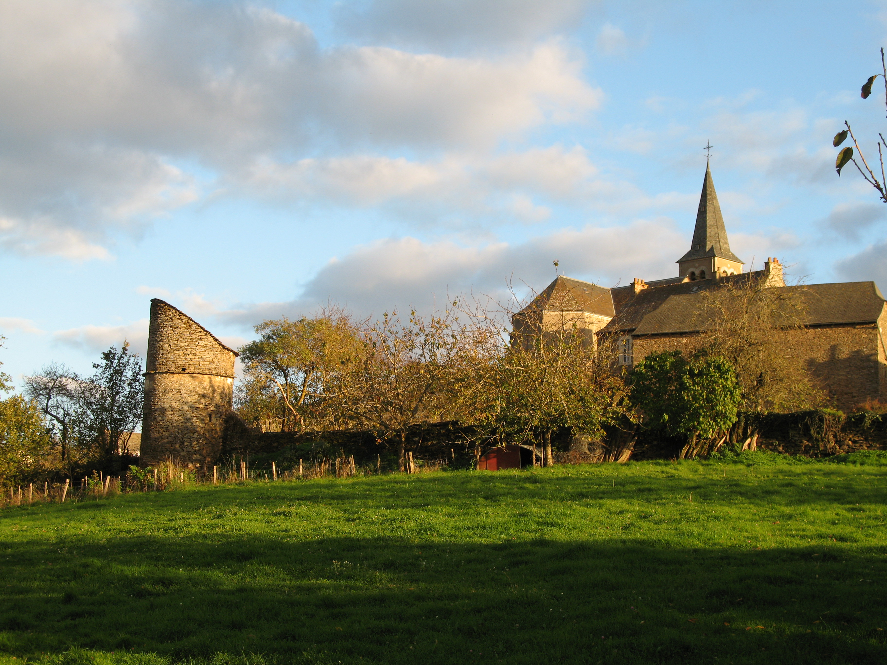 vue générale de Quins (Aveyron)